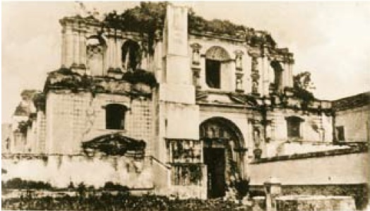 Ruina de la Compañía de Jesús en Antigua Guatemala en 1900.